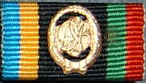 DSA Gold Bandschnalle